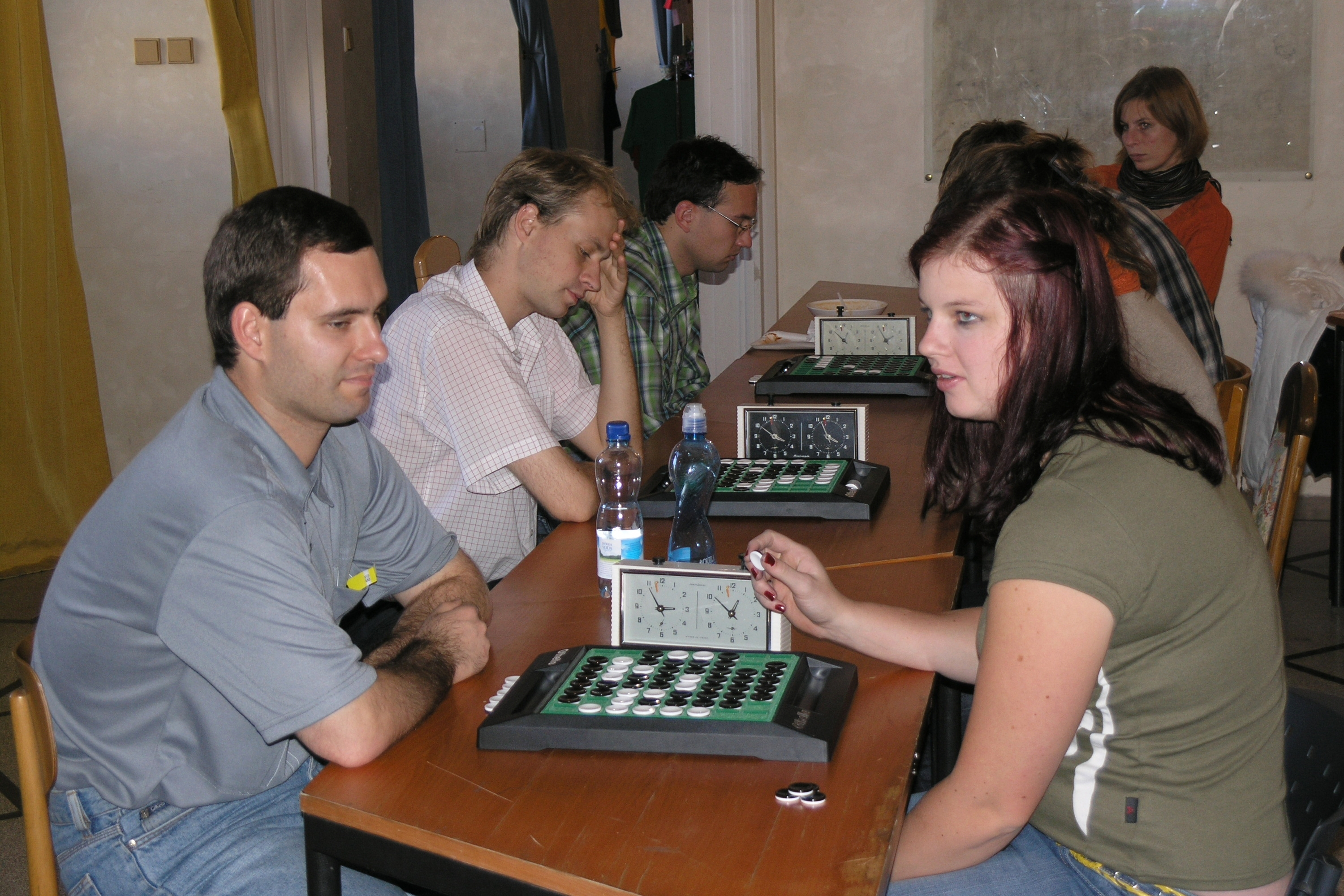 Herní festival Deskohraní 2008 - Othello